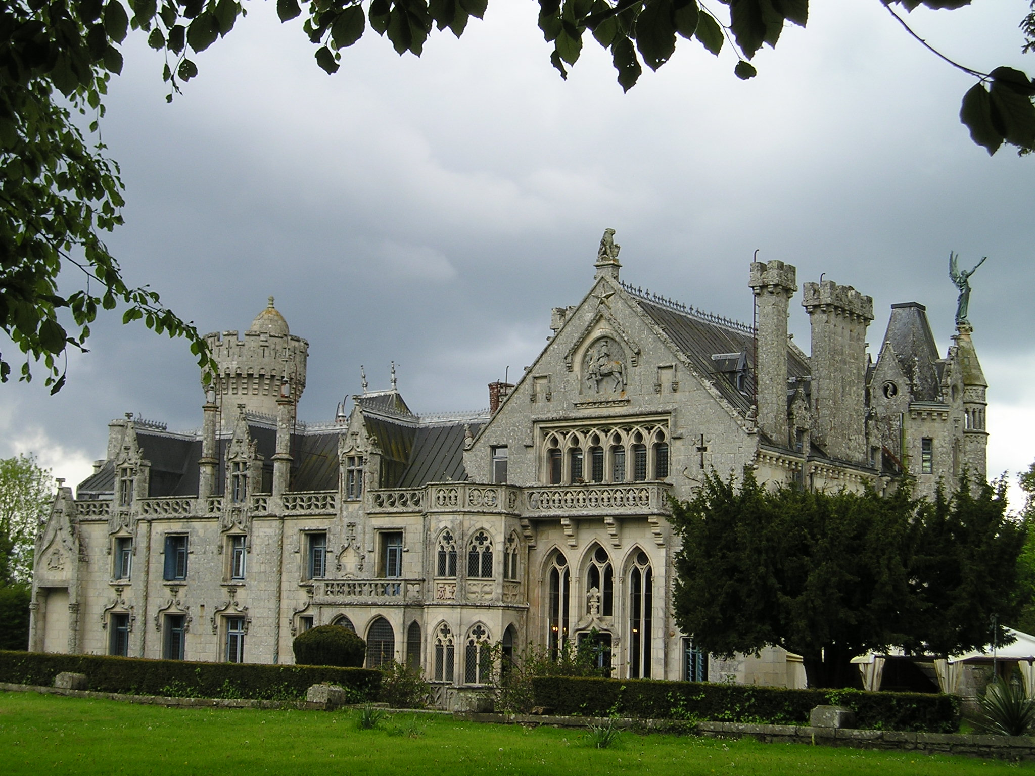 façade Sud du château de Kériolet